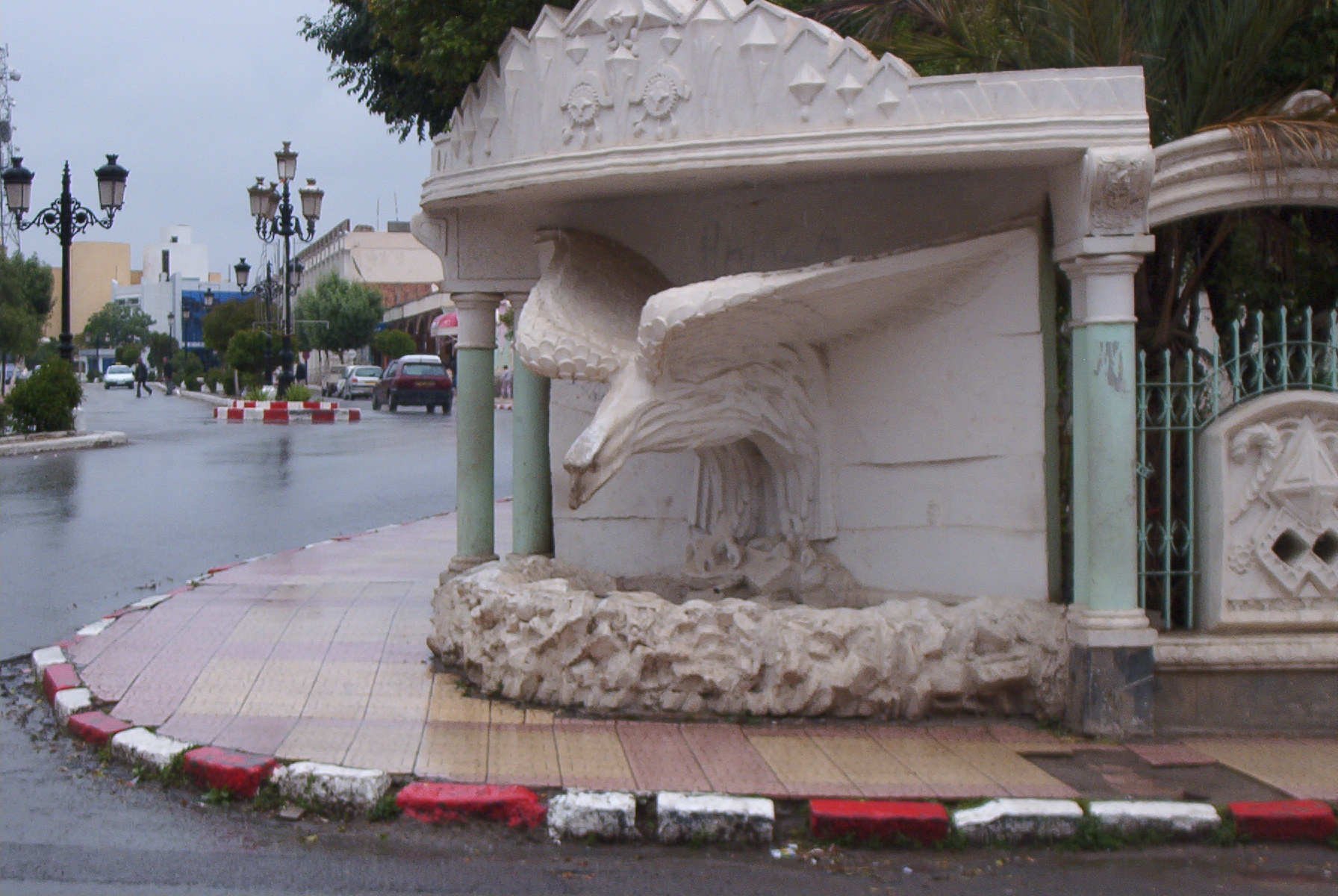 Rue de Bordj Bou Arreridj